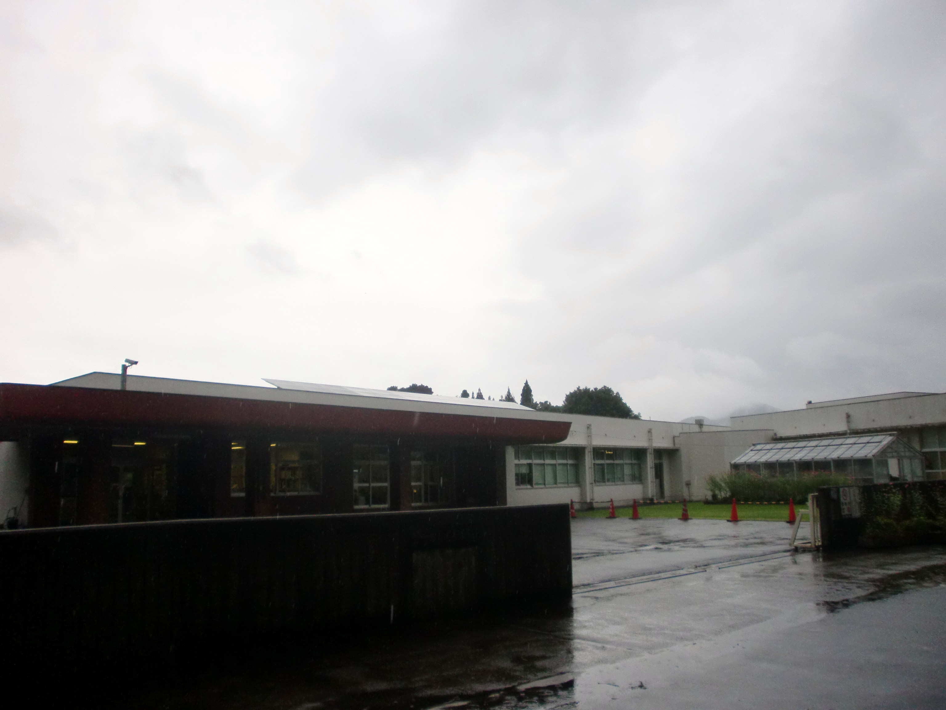 鹿児島県立皆与志養護学校の外観。